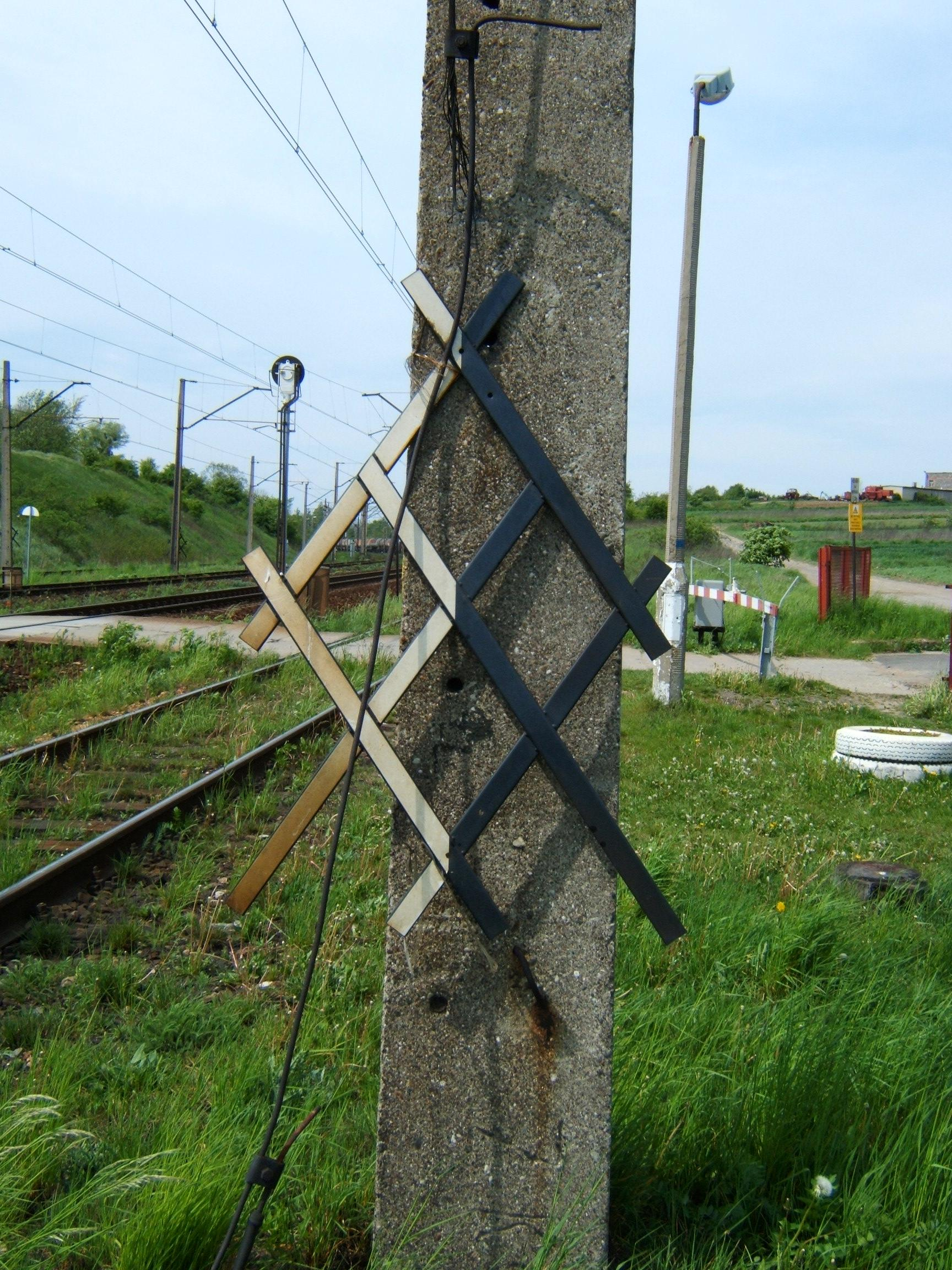 Wskaźnik W13, zawieszony na słupie trakcyjnym przez przejazdem kolejowym w Nakle Śląskim